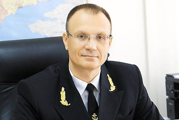 Щуриков Николай Александрович